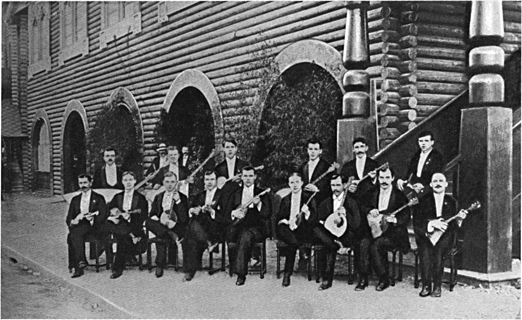 Оркестр В.В. Андреева на Всемирной выставке в Париже. 1900 год.